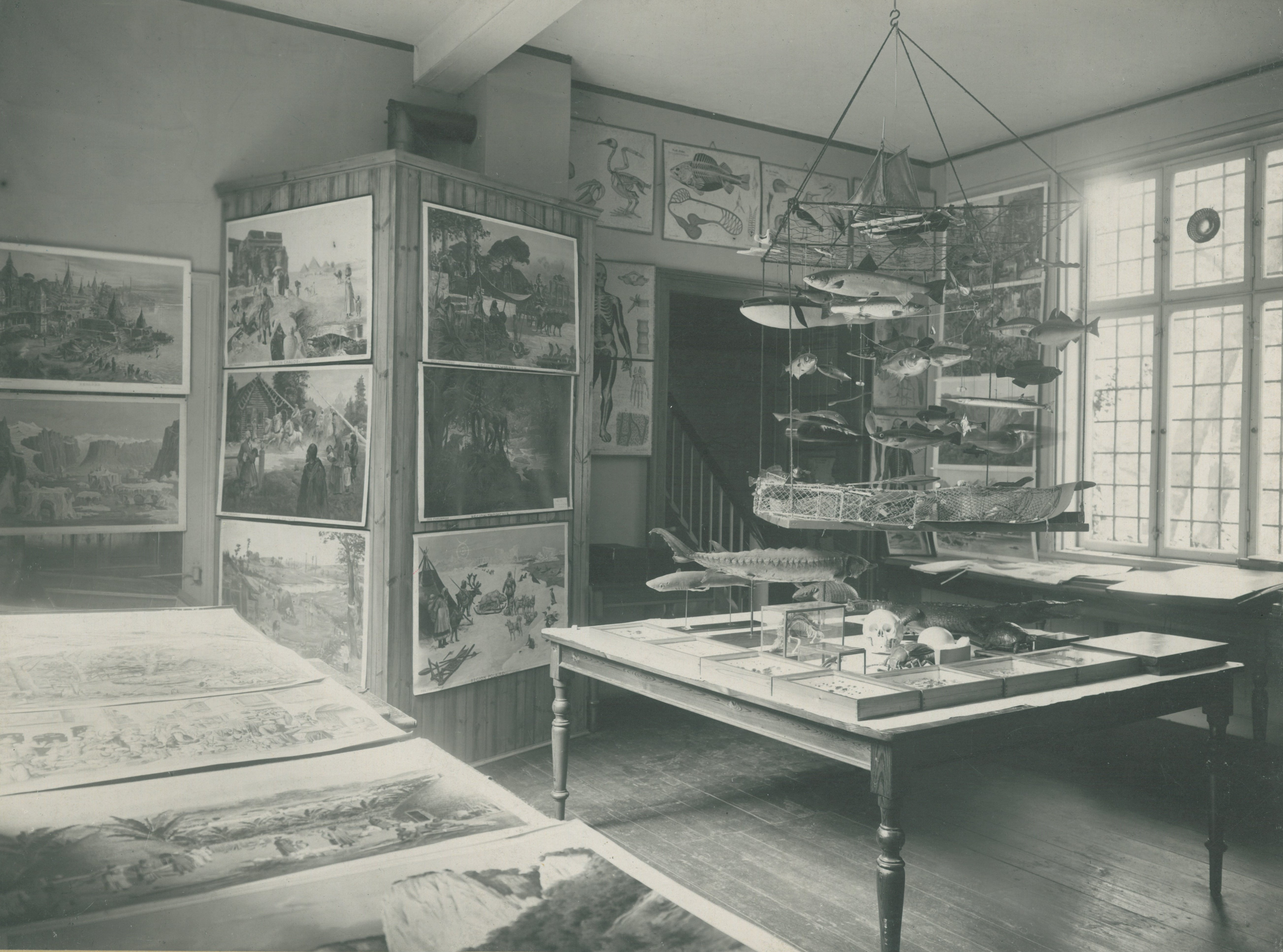 Udstilling med anskuelsestavler på Dansk Skolemuseum i 1920. Fotograf ukendt.